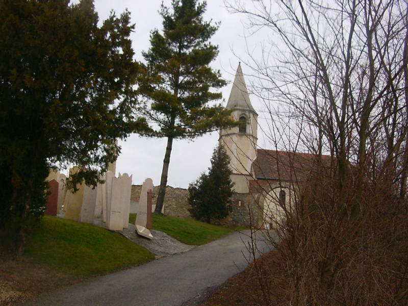 Balf település névadó temploma a Temető-dombon (Sopron)